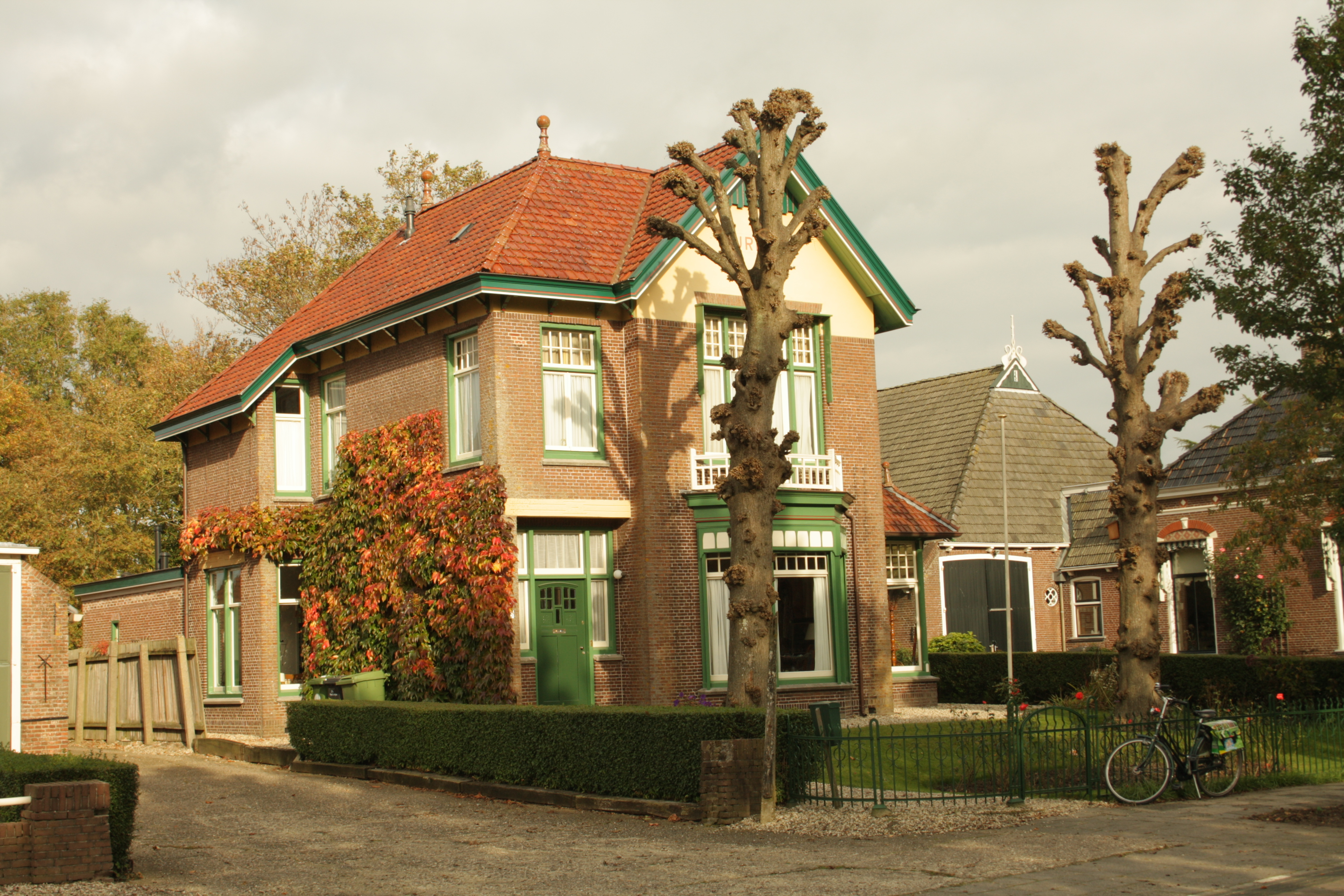 Dronrijp, Brêgebuorren 6, Aurelia